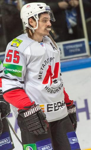 Защитник новокузнецкого «Металлурга» Брент Сопел во время матча чемпионата КХЛ против хабаровского «Амура» 21 ноября 2012 года.